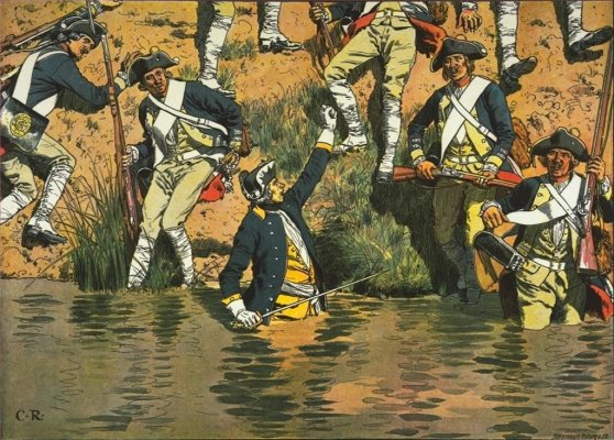 El Principe Enrique salta a un foso durante la batalla de Praga (1757)